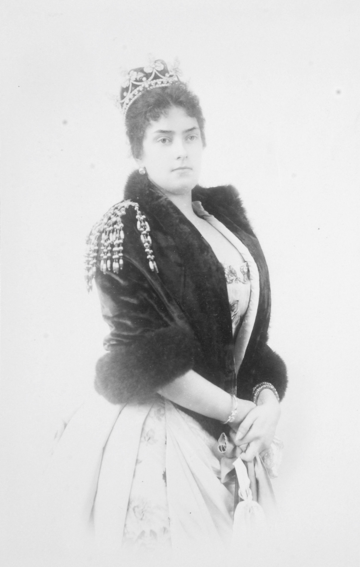 Maria Letizia Bonaparte, duchessa d'Aosta.